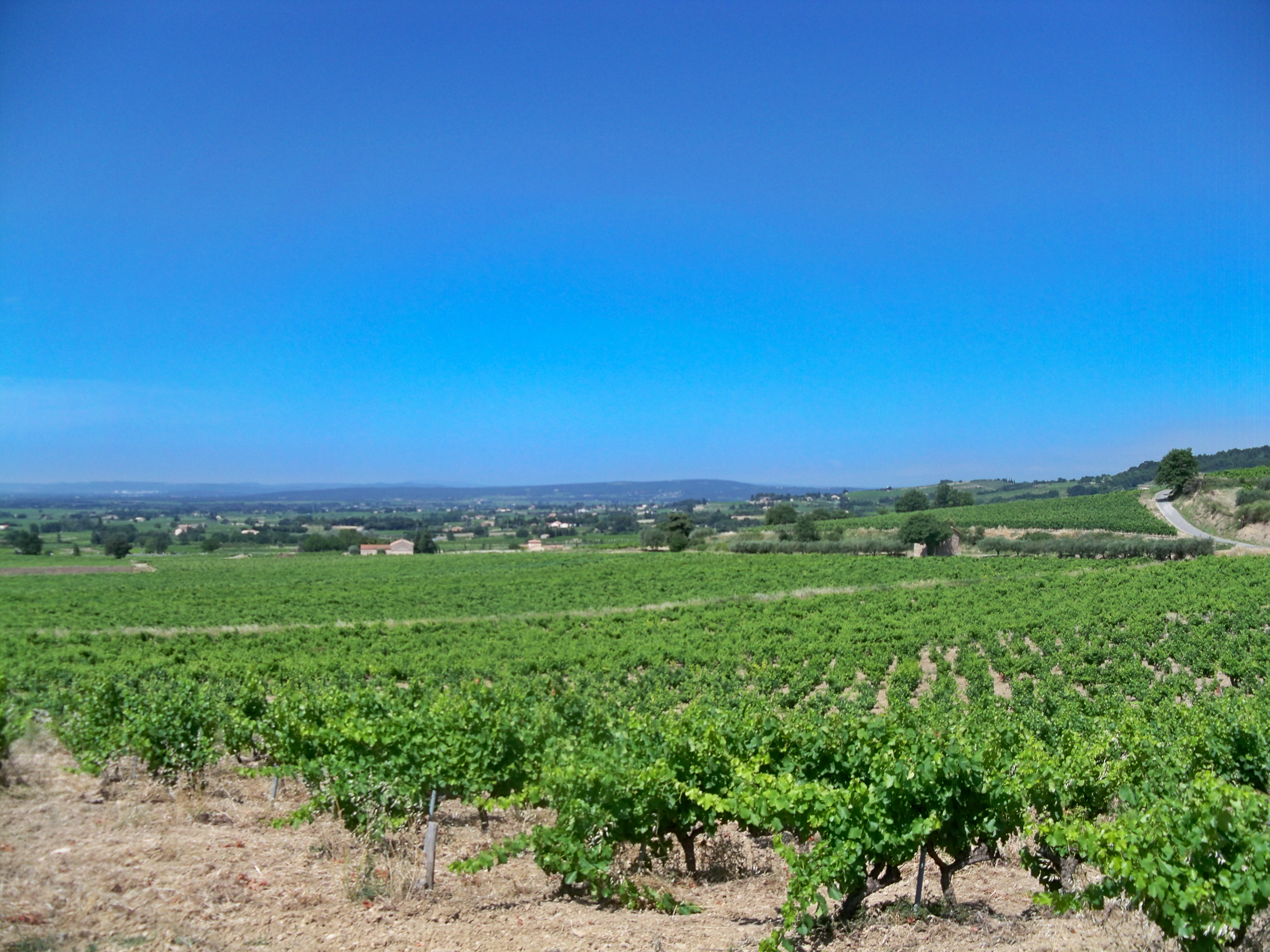 Vignobles de la vallée du Rhône, Vaucluse